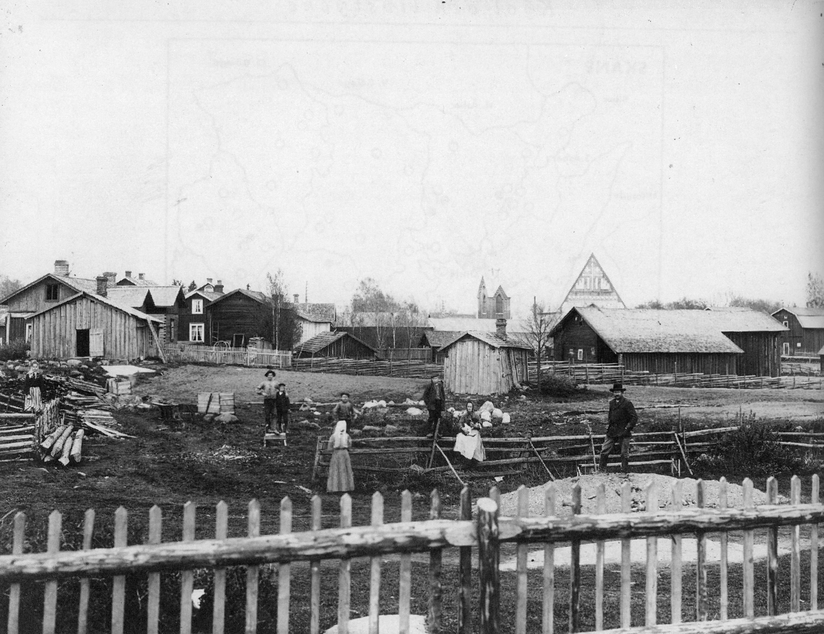 Helsinge kyrkby i slutet av 1800-talet.